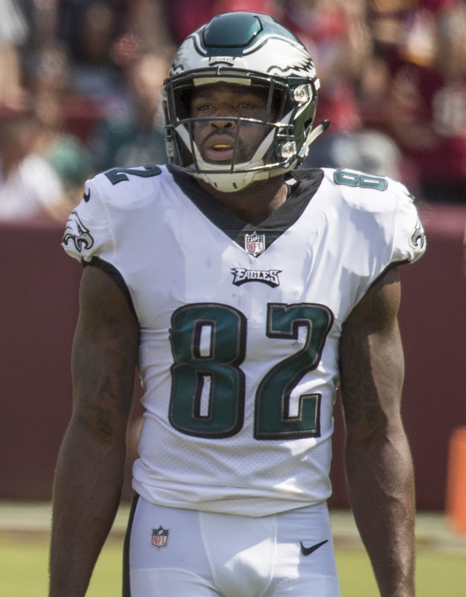 Eagles at Redskins 9/10/17